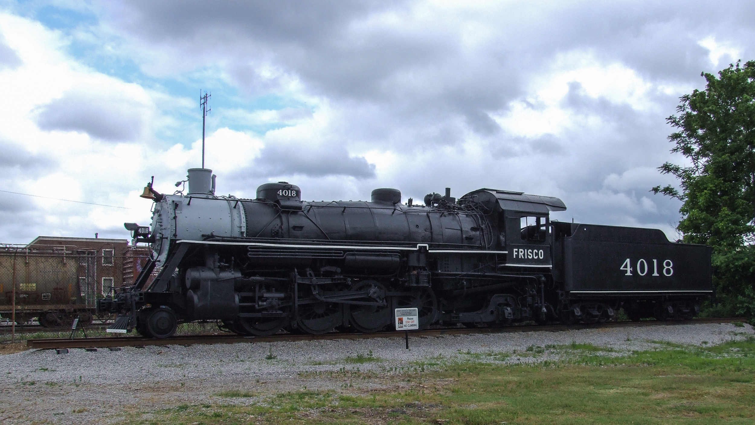 Eine von Lima locomotive works produzierte USRA Light Mikado der St. Louis – San Francisco Railway, SLSF 4018, ausgestellt im stillgelegten Roheisenwerk Sloss Furnaces in Birmingham, Alabama, USA.